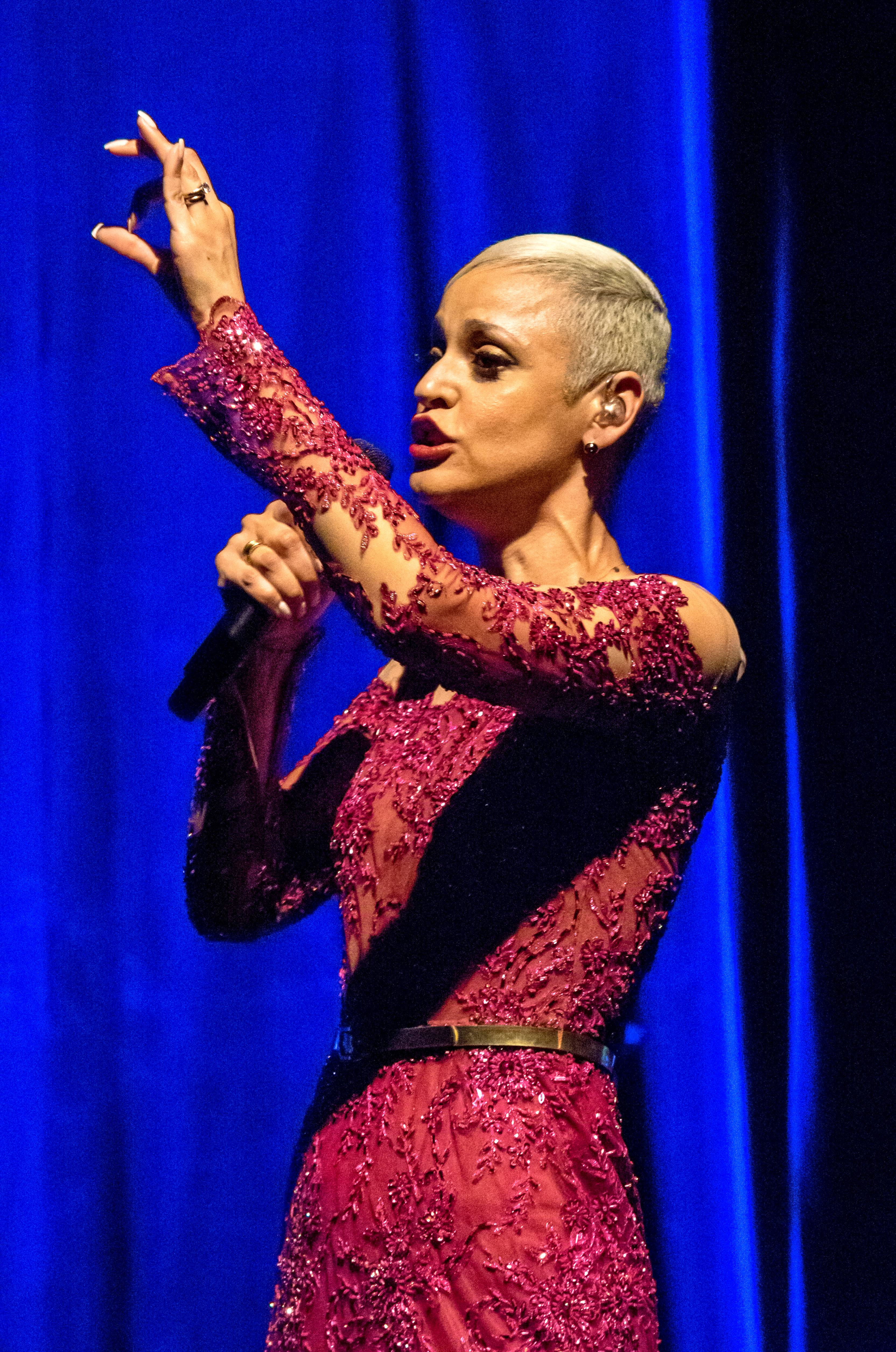 Bilder vom ZMF 2015 Mariza